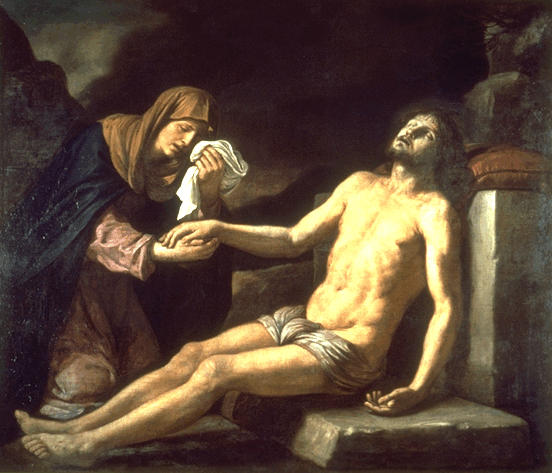 Pietà